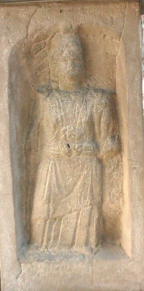 Darstellung der Minerva auf einem Viergötterstein